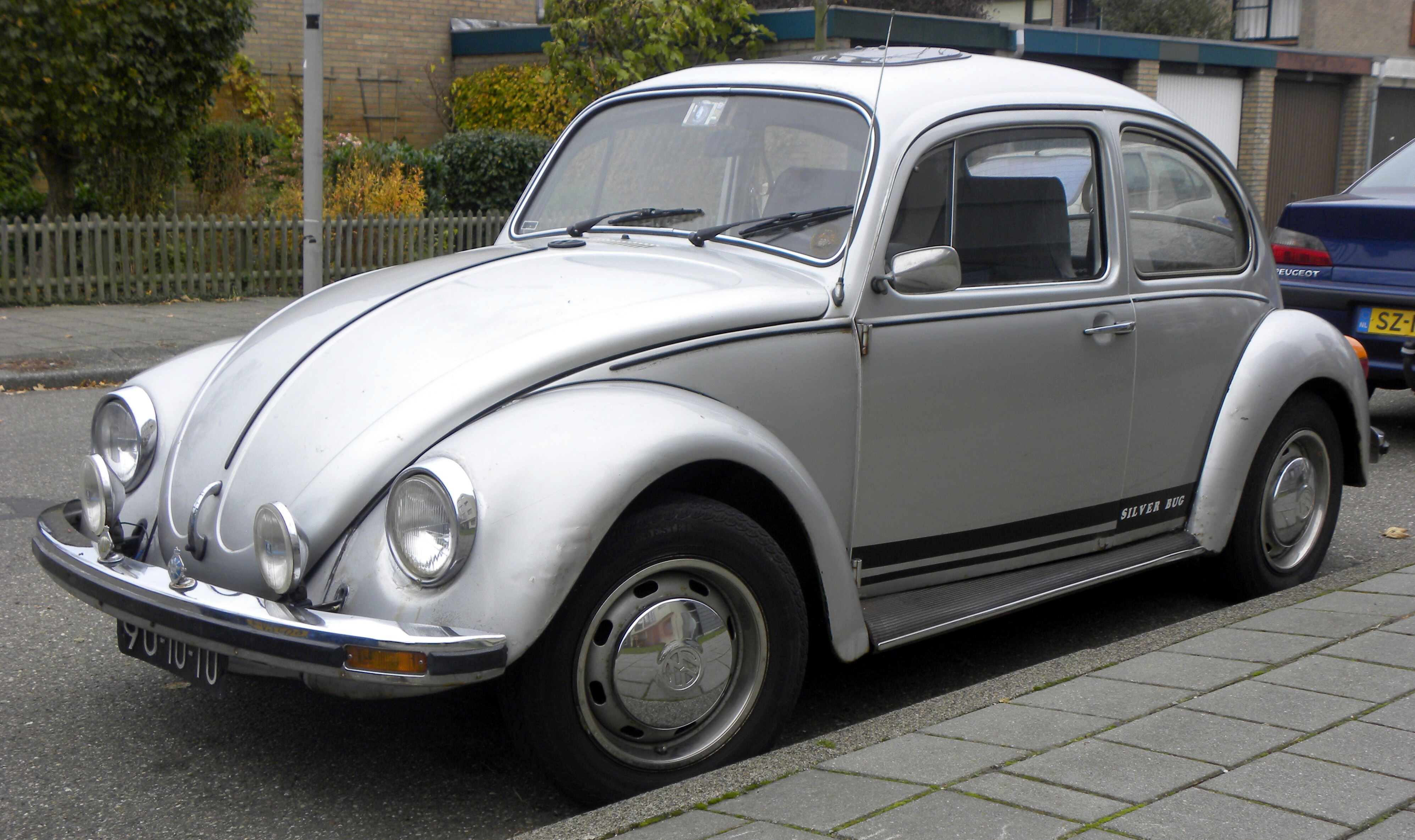 VW Beetle Silver Bug